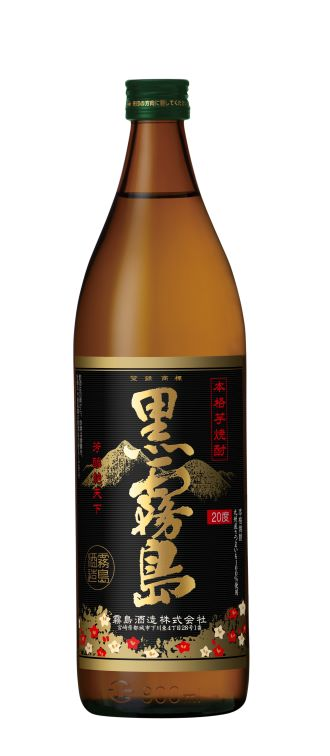 黒霧島画像